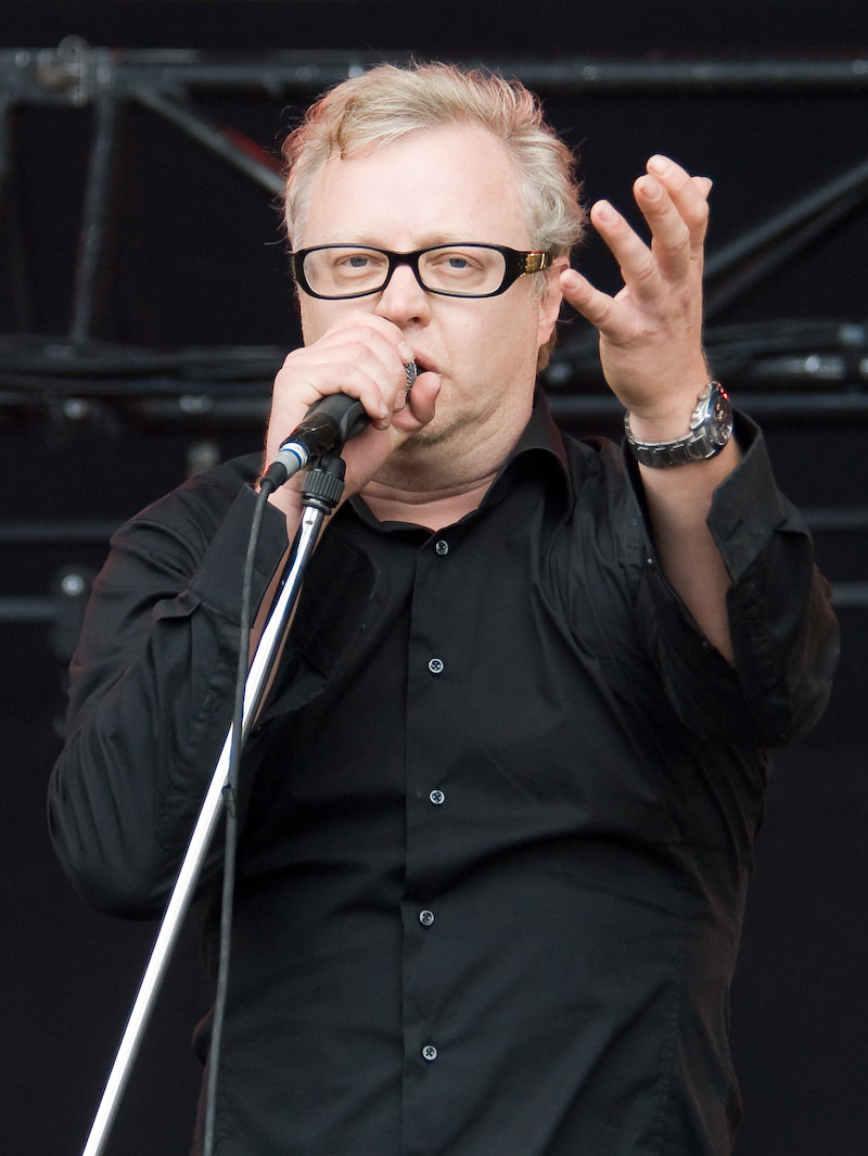 Stijn Meuris, 0110 concert on 1 November 2006 in Gent, Belgium cropped